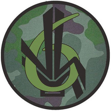 Oznaka rozpoznawcza na mundur polowy 6 batalionu chemicznego Sił Powietrznych